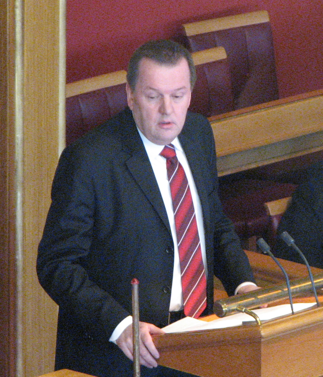 Stortingsrepresentant Inge Ryan for Nord-Trøndelag SV i Stortinget 12. februar 2009.